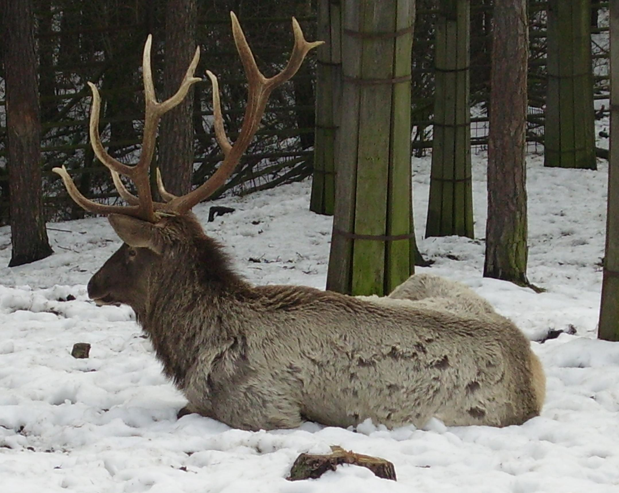 Jelen sibiřský; ZOO Olomouc